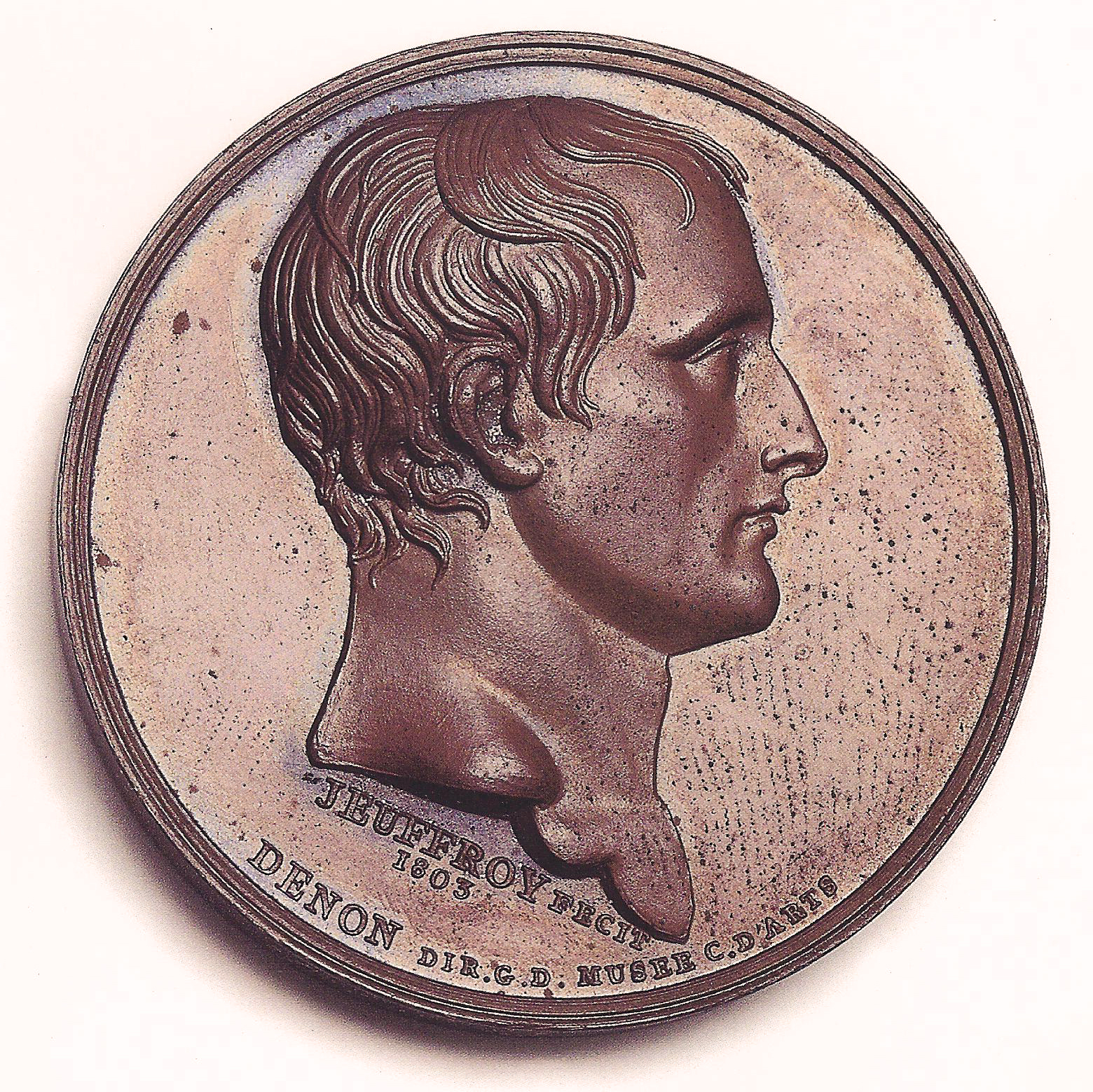 franz. Bronzemedaille, Vorderseite, geprägt 1803 in der "Monnaie de Paris" unter der Regie von Vivant Denon